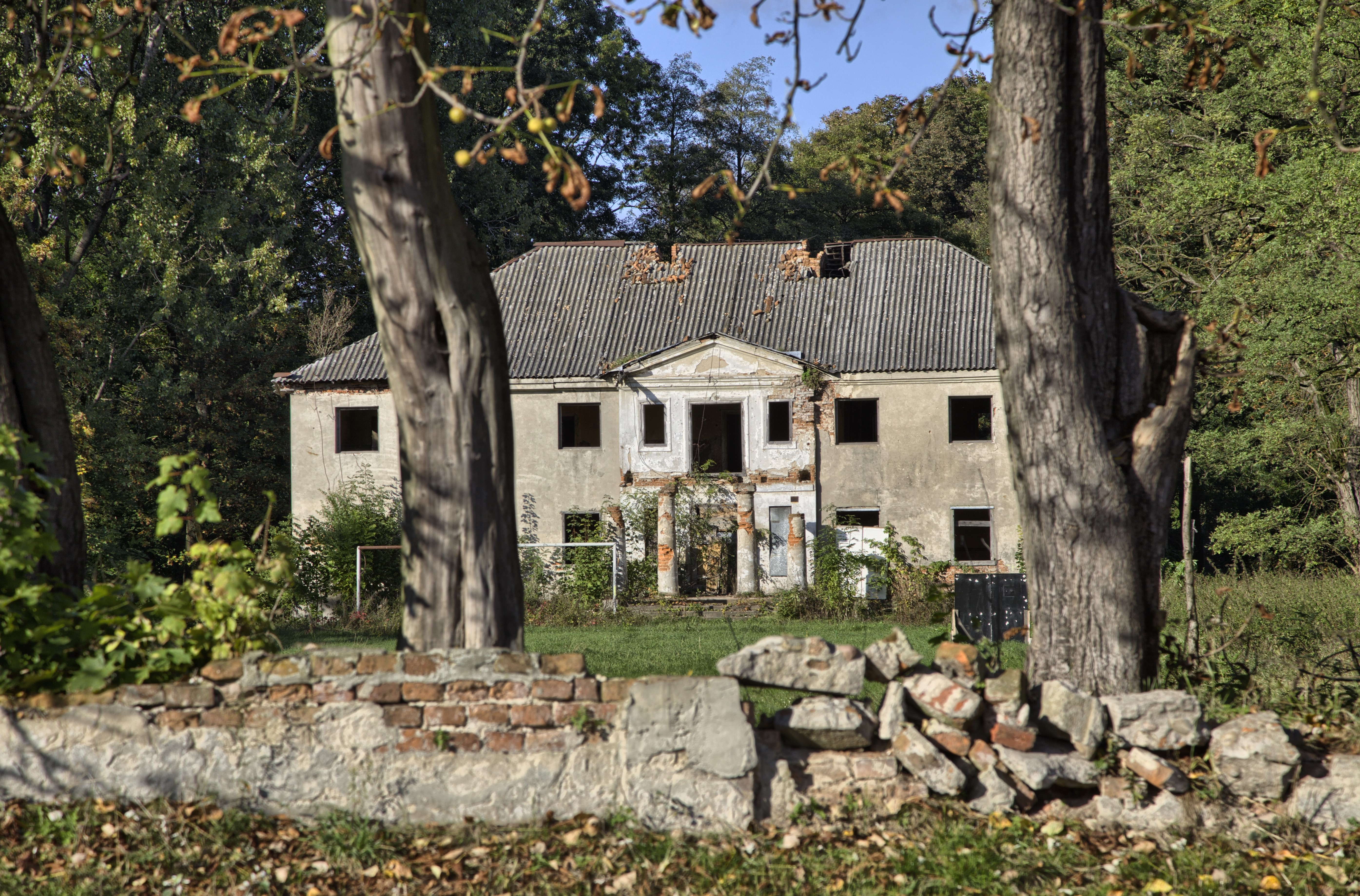 Chorzenice, dwór (II), pocz. XIX